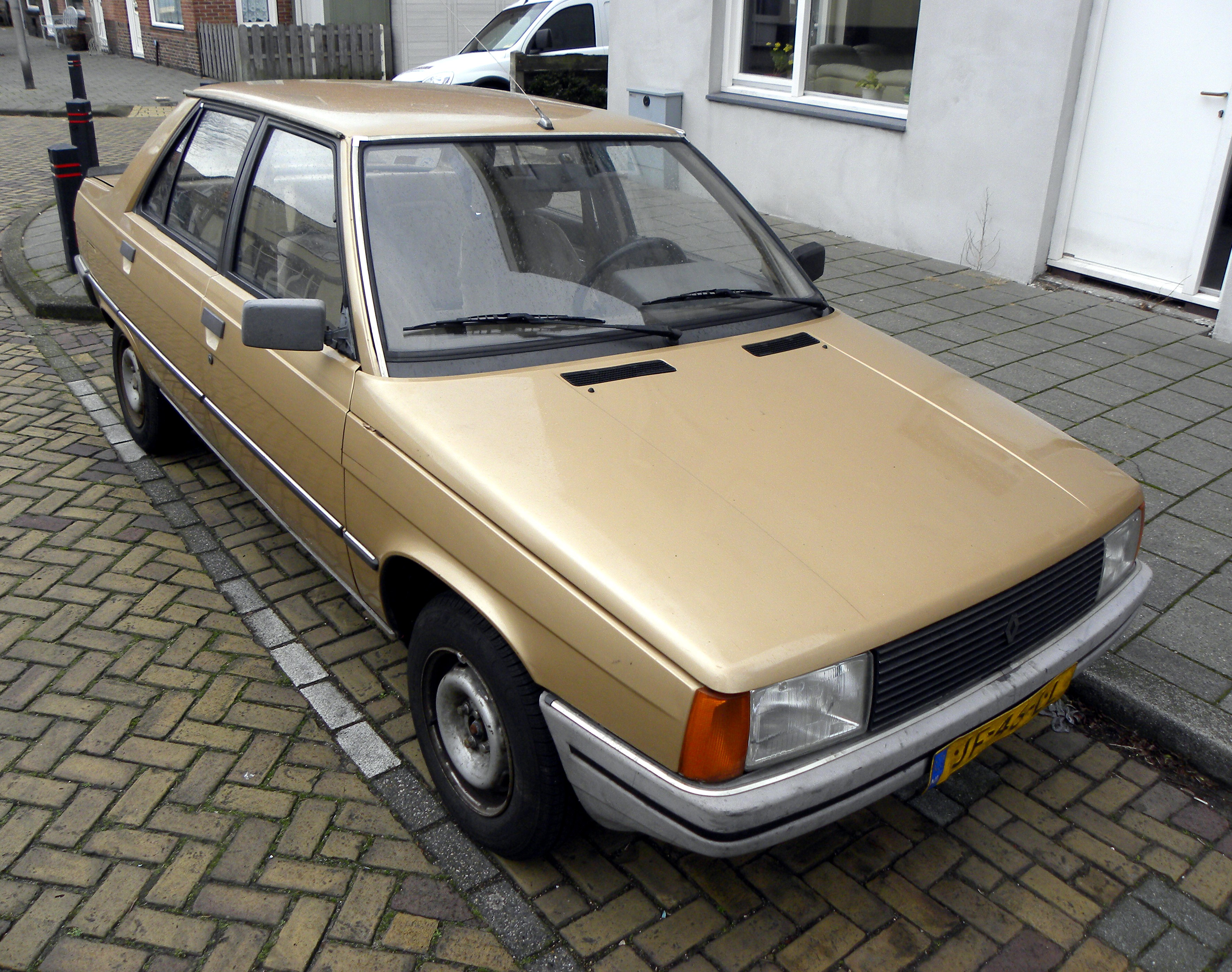 1982 Renault 9 Automatic